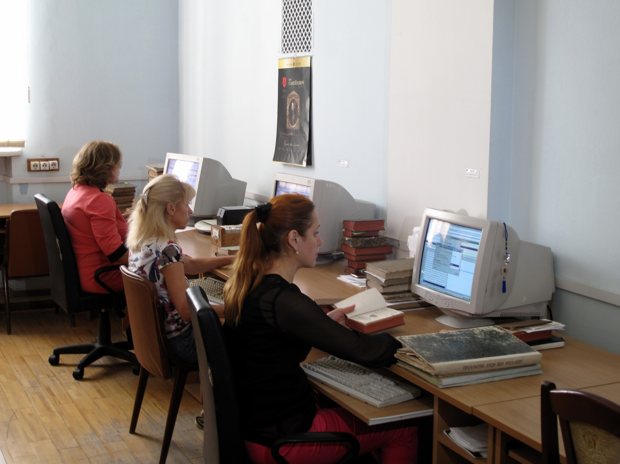 Співробітники відділу каталогізації НБУВ